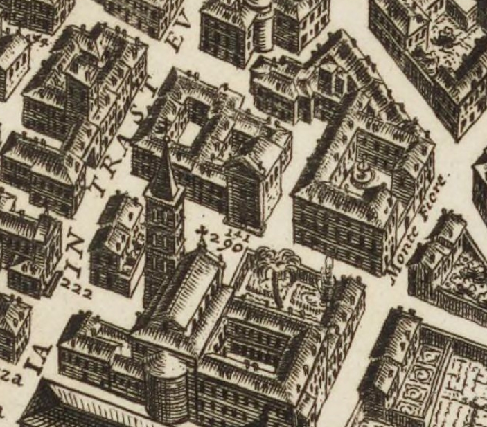 Pianta di Falda